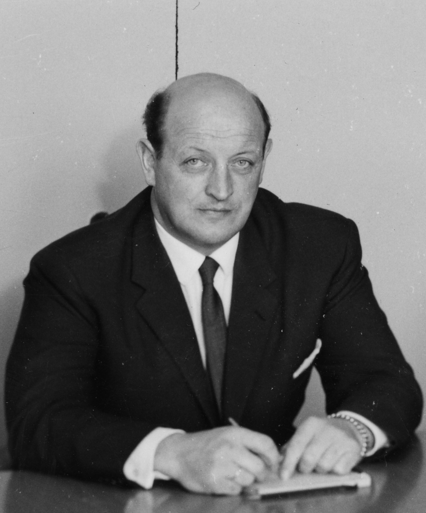 Format: Fotopositiv Dato / Date: 23 November 1963 Fotograf / Photographer: Foto Schrøder Sted / Place: Trondheim Eier / Owner Institution: Trondheim byarkiv, The Municipal Archives of Trondheim Arkivreferanse / Archive reference: TOR.h49.b04.F28762